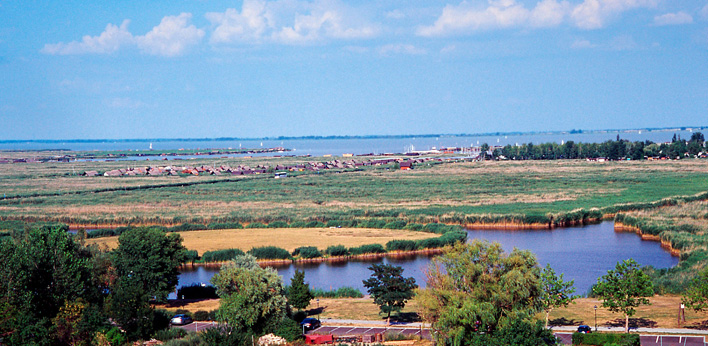 Straße zum Strandbad von Rust, Neusiedlersee, Österreich.